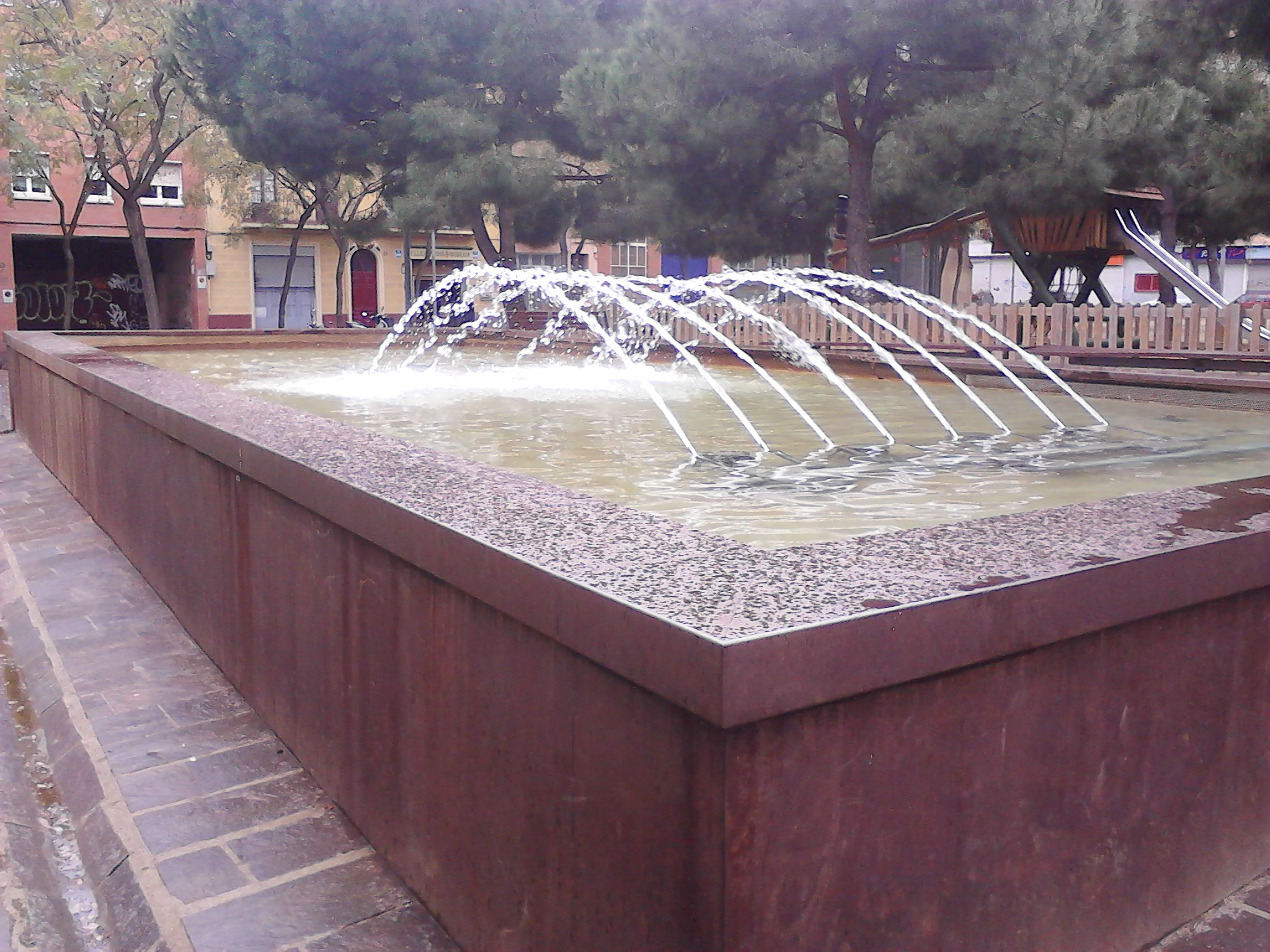 Font de l'Assemblea de Catalunya. Pl. de l'Assemblea de Catalunya (Barcelona)